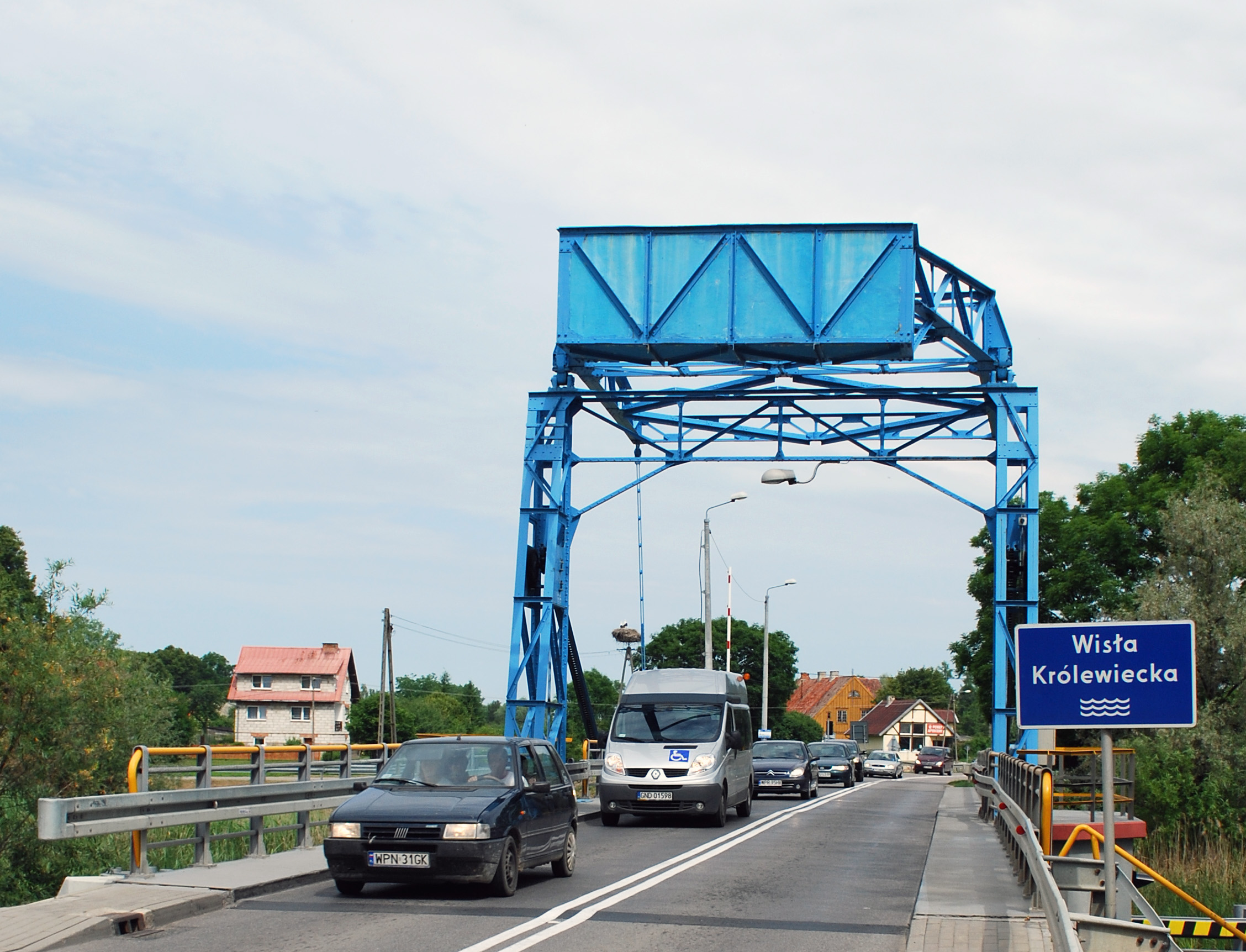 Rybina - most drogowy zwodzony II na rz. Wiśle Królewieckiej, 1933 w ciągu drogi wojewódzkiej nr 502